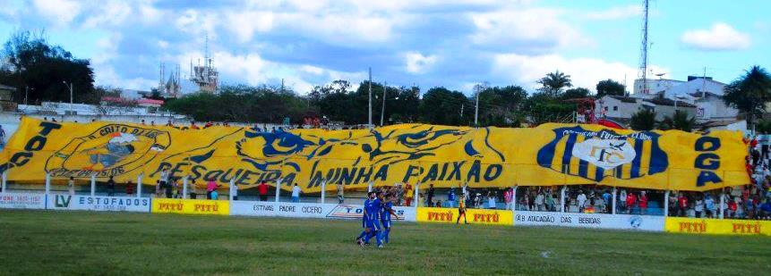 Bandeirão da Torcida estendido na arquibancada do estádio